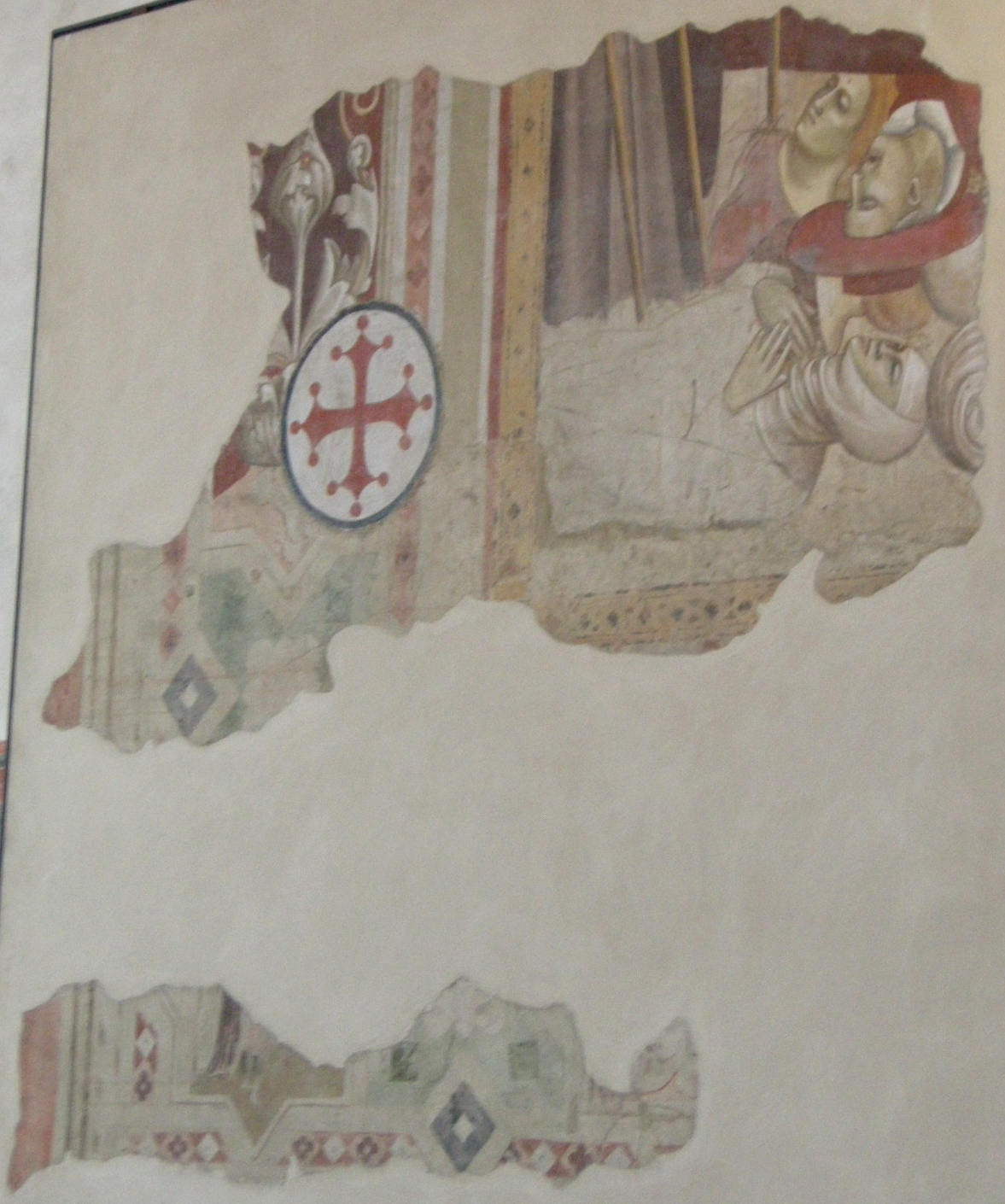 Refettorio santa croce, frammento di andrea orcagna